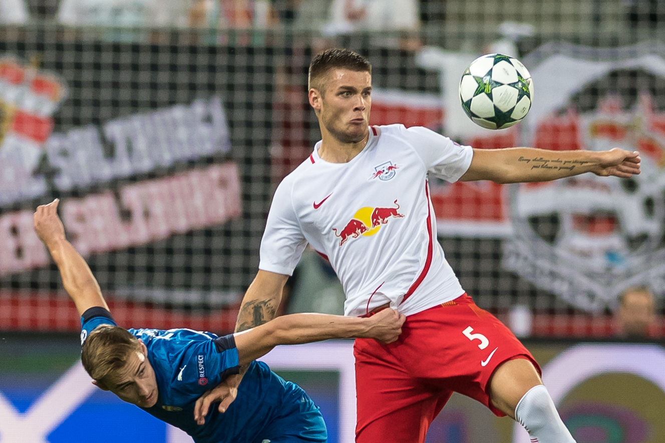 UEFA Champions League - Play-Offs - FC Salzburg vs Dinamo Zagreb. Bild zeigt Marko Rog (Dinamo Zagreb) und Duje Caleta-Car (RBS).